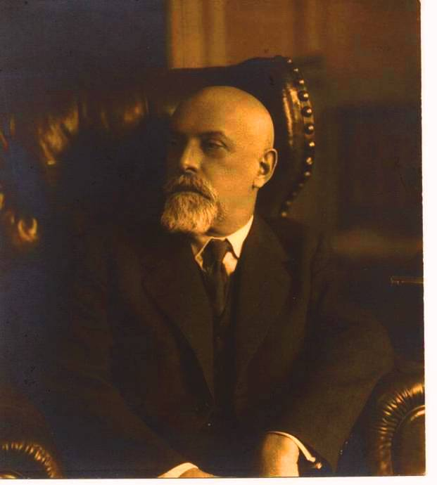 Фотопортрет Максима Петровича Кончаловского